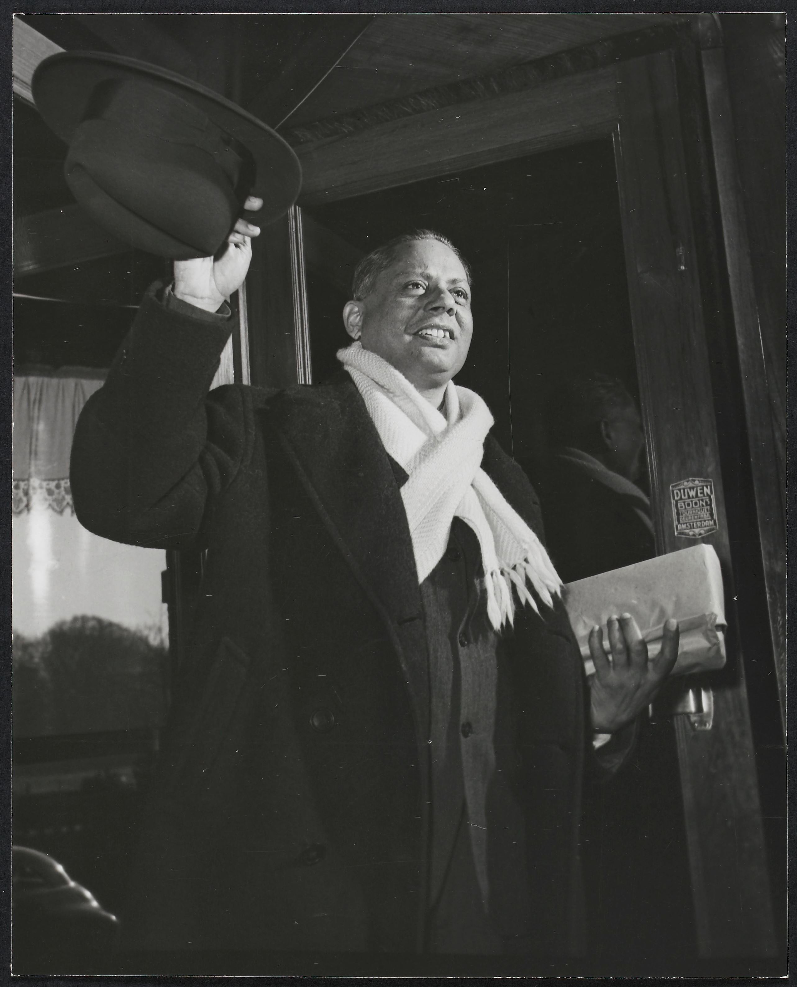 IdentificatieTitel(s): Een van de deelnemers aan de RTC: de heer J.P. Kaulesar SukulSurinamers in Nederland: 29 foto's uit het archief van Ons Vrije Nederland (serietitel)Objecttype: documentaire foto Objectnummer: NG-2005-19-16Omschrijving: Een van de deelnemers namens Suriname aan de Ronde Tafel Conferentie tussen Nederland en de West: de politicus J.P. Kaulesar Sukul, voorzitter van de Hindoe Partij Suriname en waarnemend Hoofd Centraal Archief. Zwaaiend met zijn hoed komt hij door de draaideur.Waar: nemend Hoofd Centraal Archief. Zwaaiend met zijn hoed komt hij door de draaideur.VervaardigingVervaardiger: fotograaf: ParticamPlaats vervaardiging: Den HaagDatering: feb-1948Materiaal: fotopapier Techniek: fotografieAfmetingen: h 20 cm. × b 15 cm. OnderwerpWat: Rondetafelconferentie (1948)Wanneer: 1948-02 - 1948-02WaarDen HaagNederlandSurinameWie: Hindoe Partij SurinameJ. P. Kaulesar SukulVerwerving en rechtenVerwerving: aankoop 2005Copyright: Publiek domein